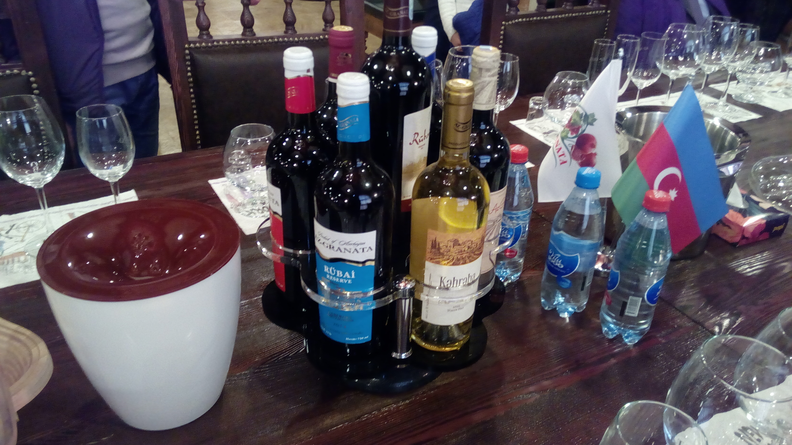 MİRAS-la Az-Granataya səfər